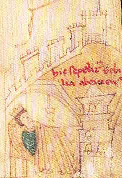 Smrt Sibyly Burgundské při porodu